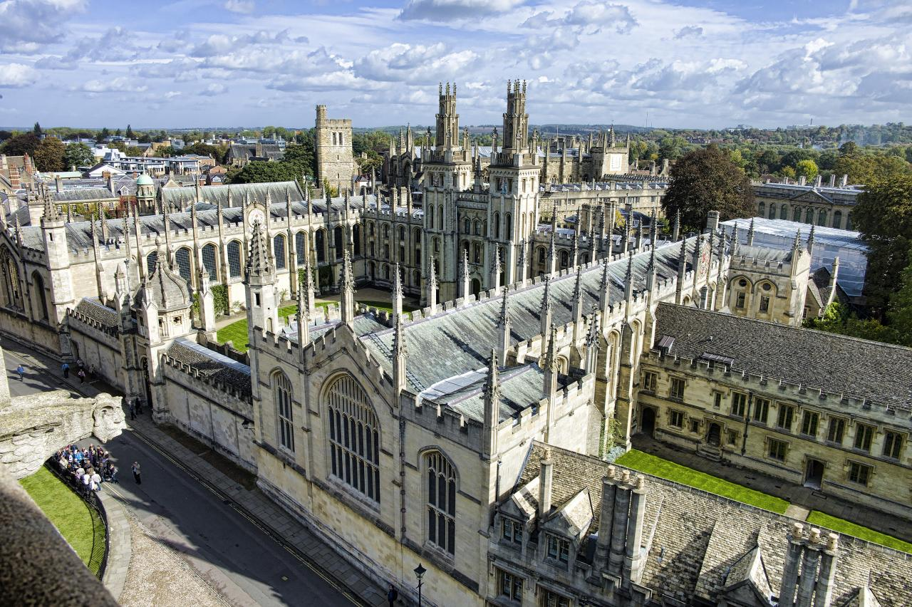 merry olde england